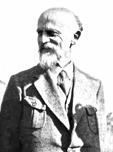 Gustav Wyneken (1875–1964)